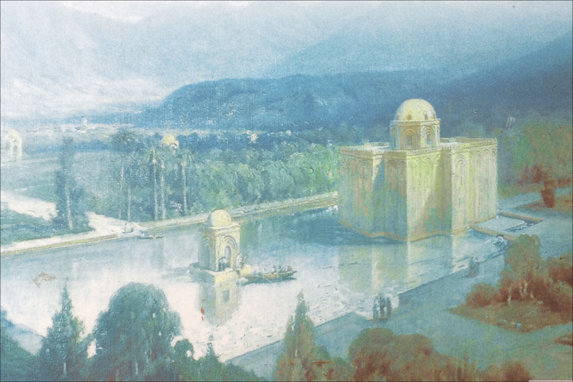 Interprétation proposée à l'entrée du monument (photo Iphone4S à travers une vitre) Aujourd'hui la Cuba est en pleine ville et le bassin a disparu depuis longtemps ____________ La Cuba était l'une des résidences, situées en dehors de la ville dans le parc royal appelé Génoarde, construites par les souverains normands de Sicile et destinées à leurs loisirs. La Cuba date de 1180. C'est un édifice rectangulaire initialement orné d'une coupole qui a disparu. Le bâtiment était entouré d'un grand lac artificiel appelé la Peschiara. A l'intérieur, l'espace central avait en son centre une vasque d'où coulait l'eau vers le bassin extérieur. L'intérieur décoré dans le style arabe disposait de voutes à encorbellement en stalactiques (mouqarnas). Comme pour d'autres résidences arabo-normandes, la façade est ornée de grandes arcatures, sans fenêtres. La façade se termine par une frise épigraphique en caractères coufiques indiquant le nom du roi Guillaume II et la date de construction. Dans l'espace moderne de rencontre construit devant la Cuba, le texte de la frise a été traduit. Article de Wikipedia sur la Cuba Site de l'auteur en 2001